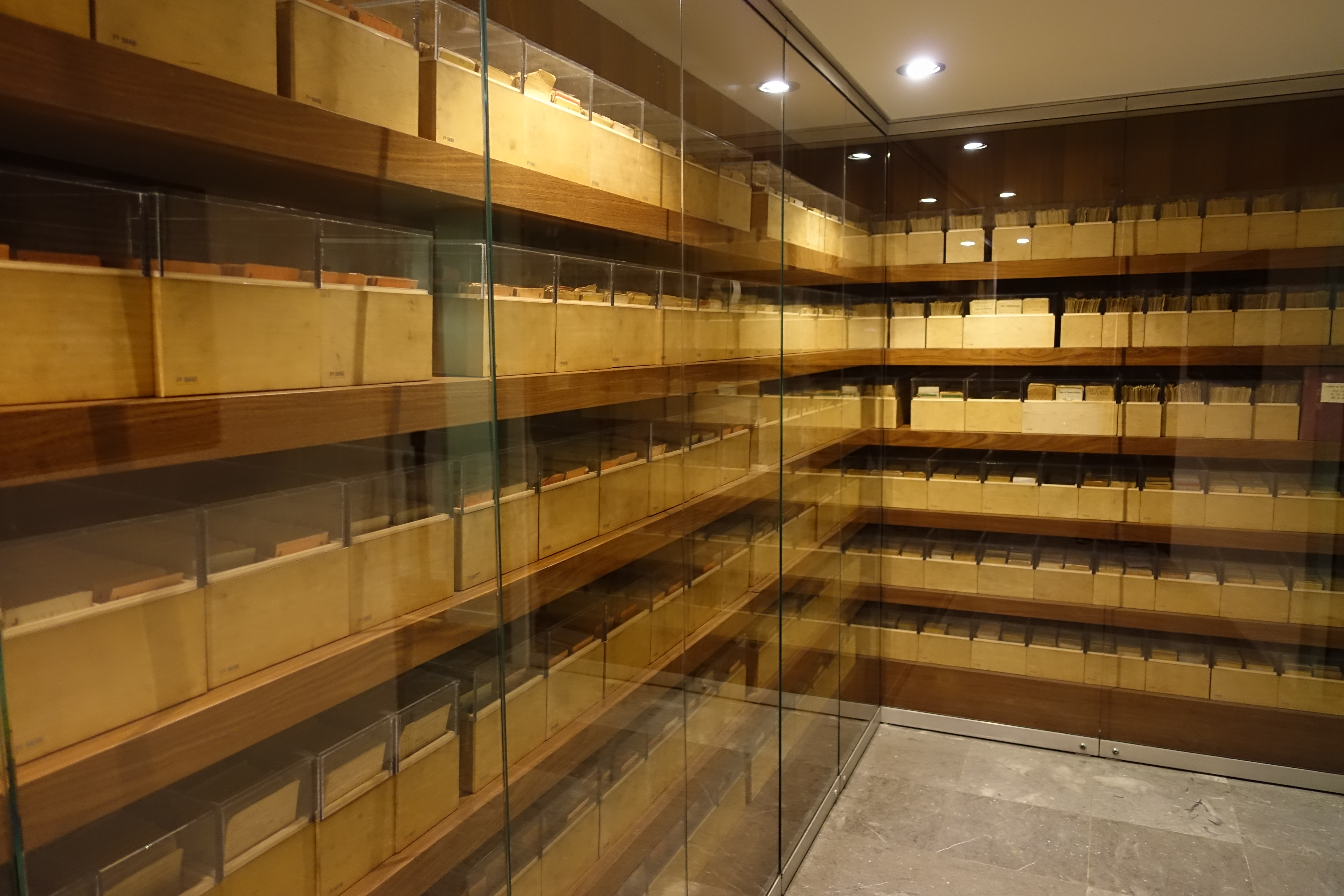 Mémorial de la Shoah @ Paris Mémorial de la Shoah, the holocaust museum in Paris, France.